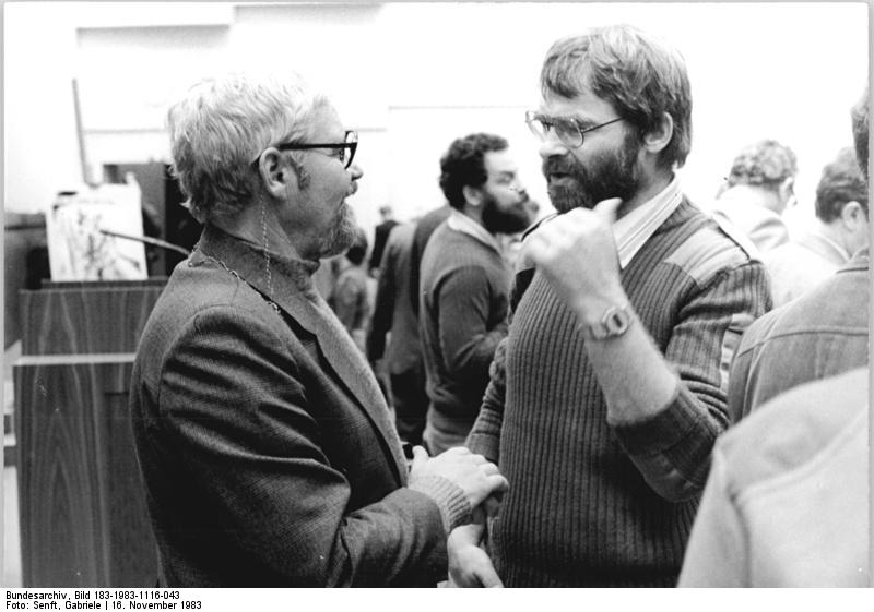 ADN-ZB-Senft-16.11.1983-Berlin: VBK-Kongreß - Gespräch in einer Beratungspaus des IX. Kongresses des Verbandes der Bildender Künstler der DDR zwischen Prof. Jo Jastram (l.) und Karl-Heinz Appelt.